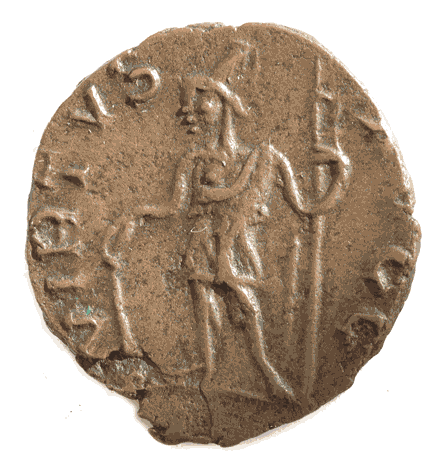 Billon antoninianus des Tetricus (271-274) mit Darstellung der virtus